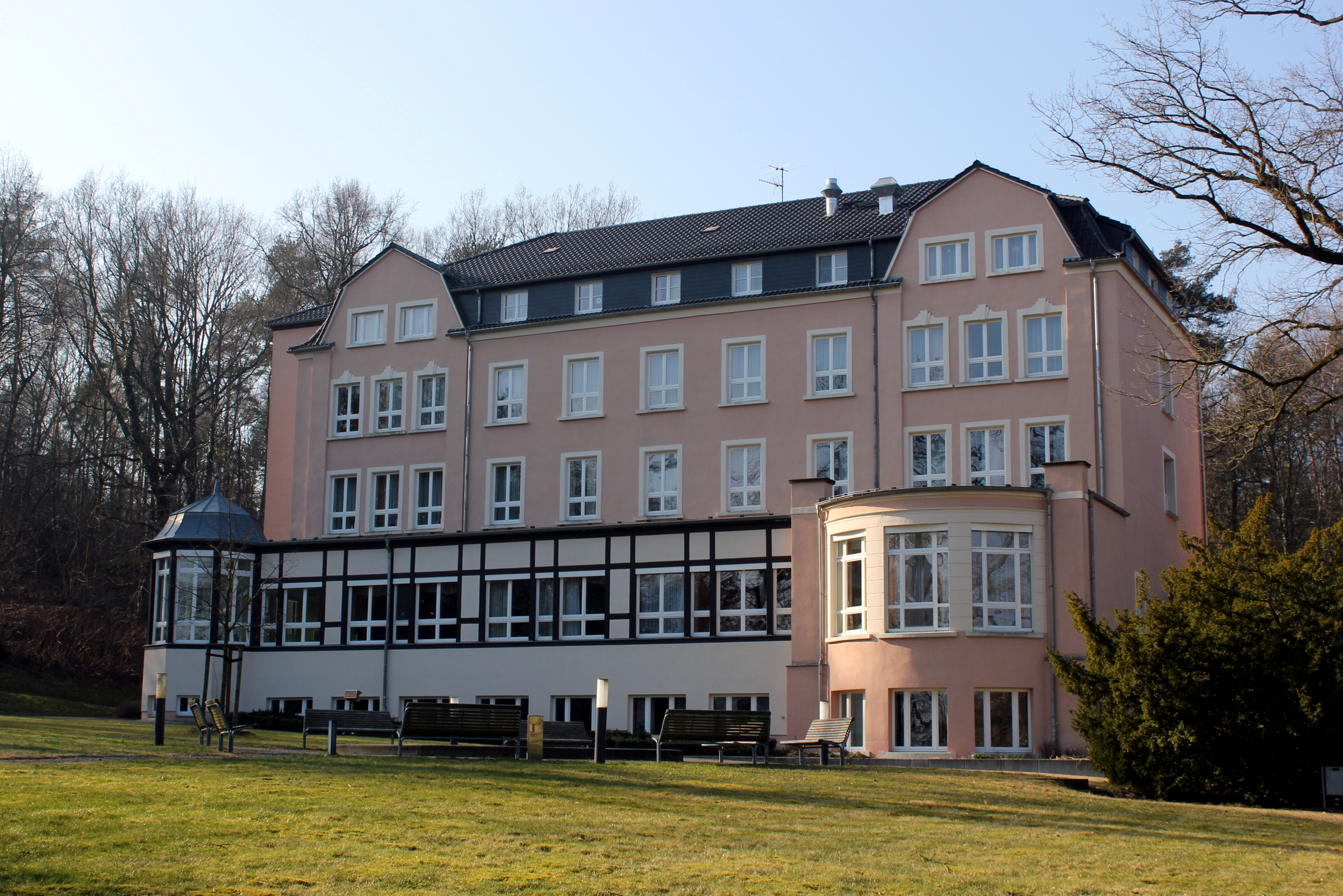 Hornjoserbsce: Janska kupjel pola Smječkec.